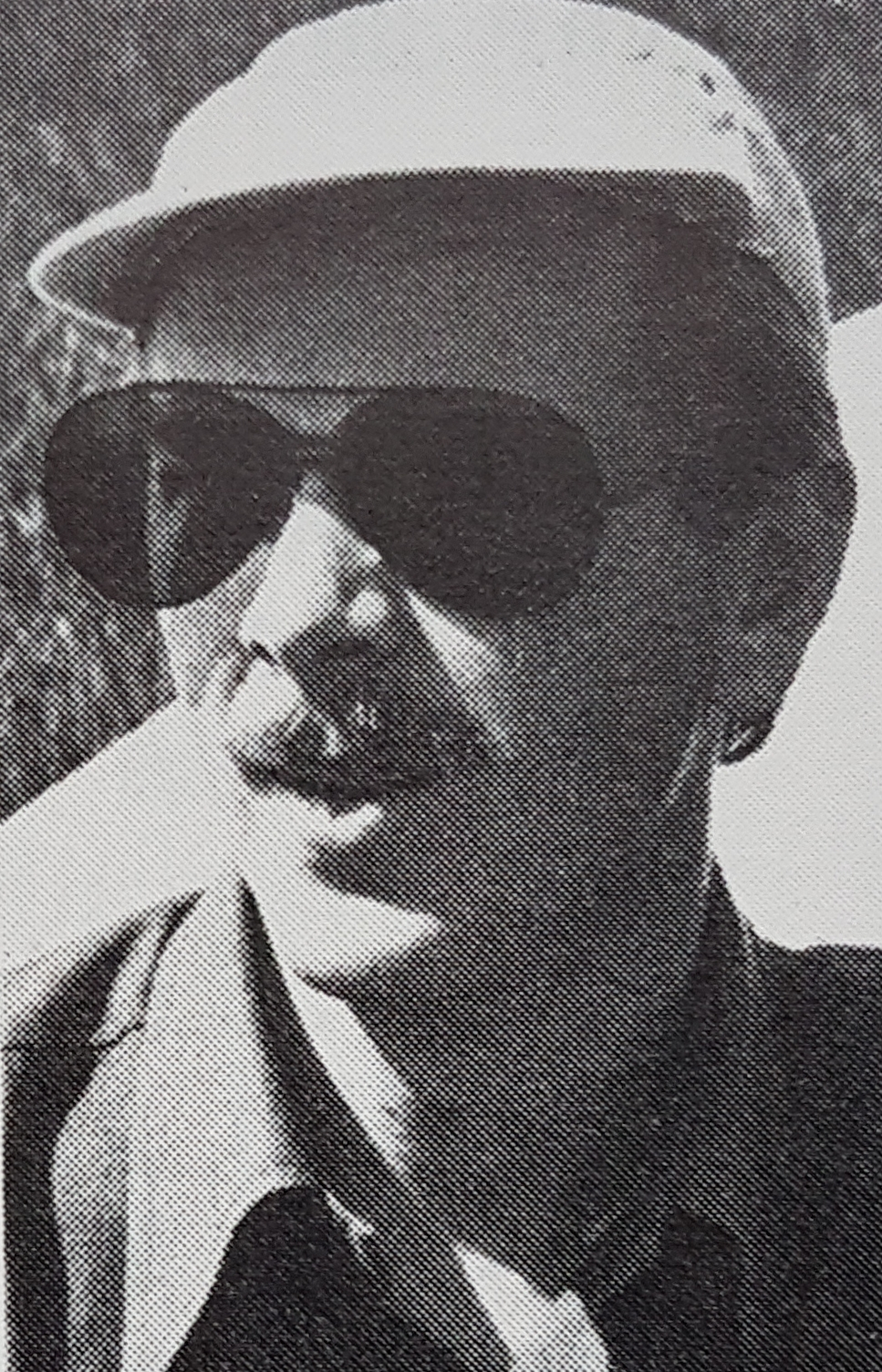 Bengt Göök SM mästare i segelflyg